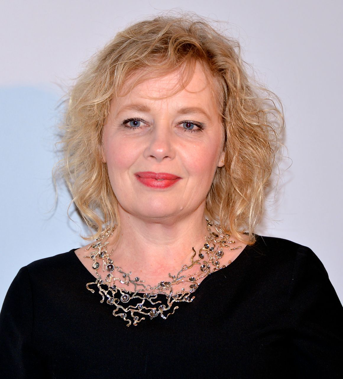 Cecilia Ljung på Guldbaggegalan på Cirkus i Stockholm 21 januari 2013.